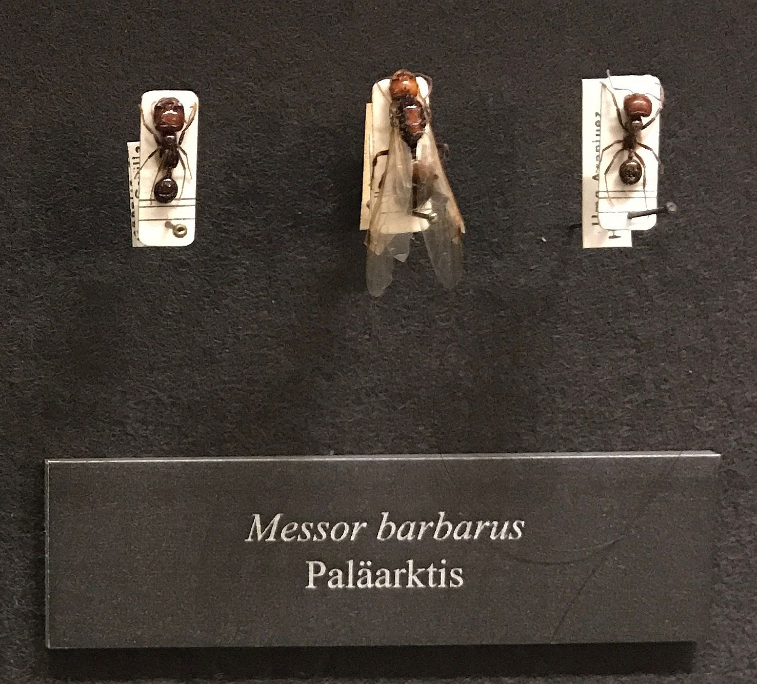 Präparat des Naturhistorischen Museums Wien Exhibit of the Museum of Natural History in Vienna